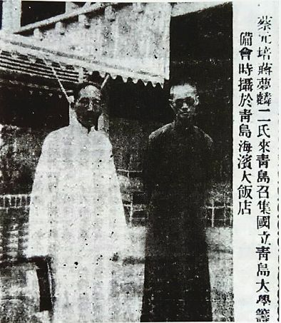 蔡元培与蒋梦麟在青岛海滨旅馆